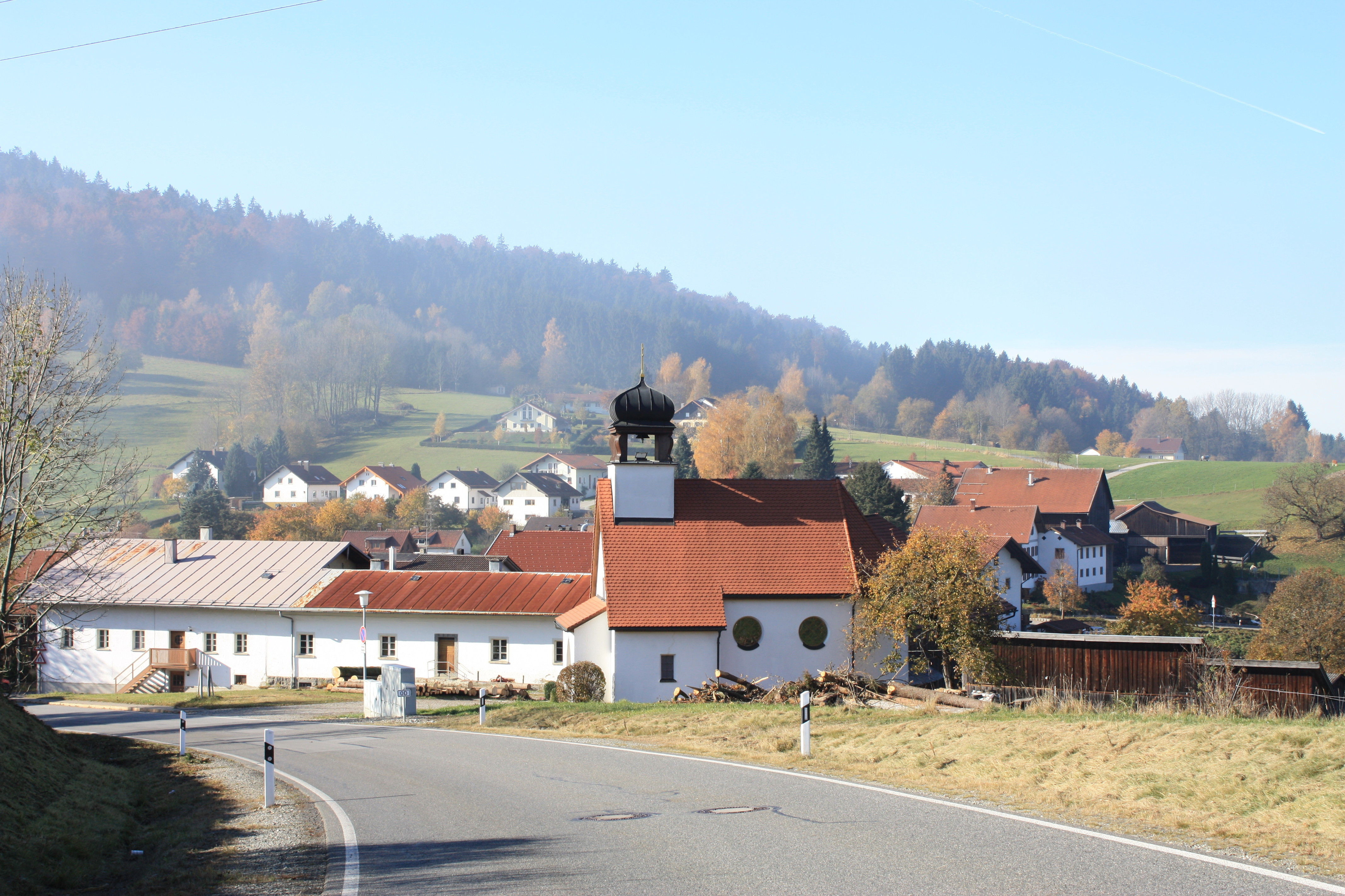 OT Aigenstadl